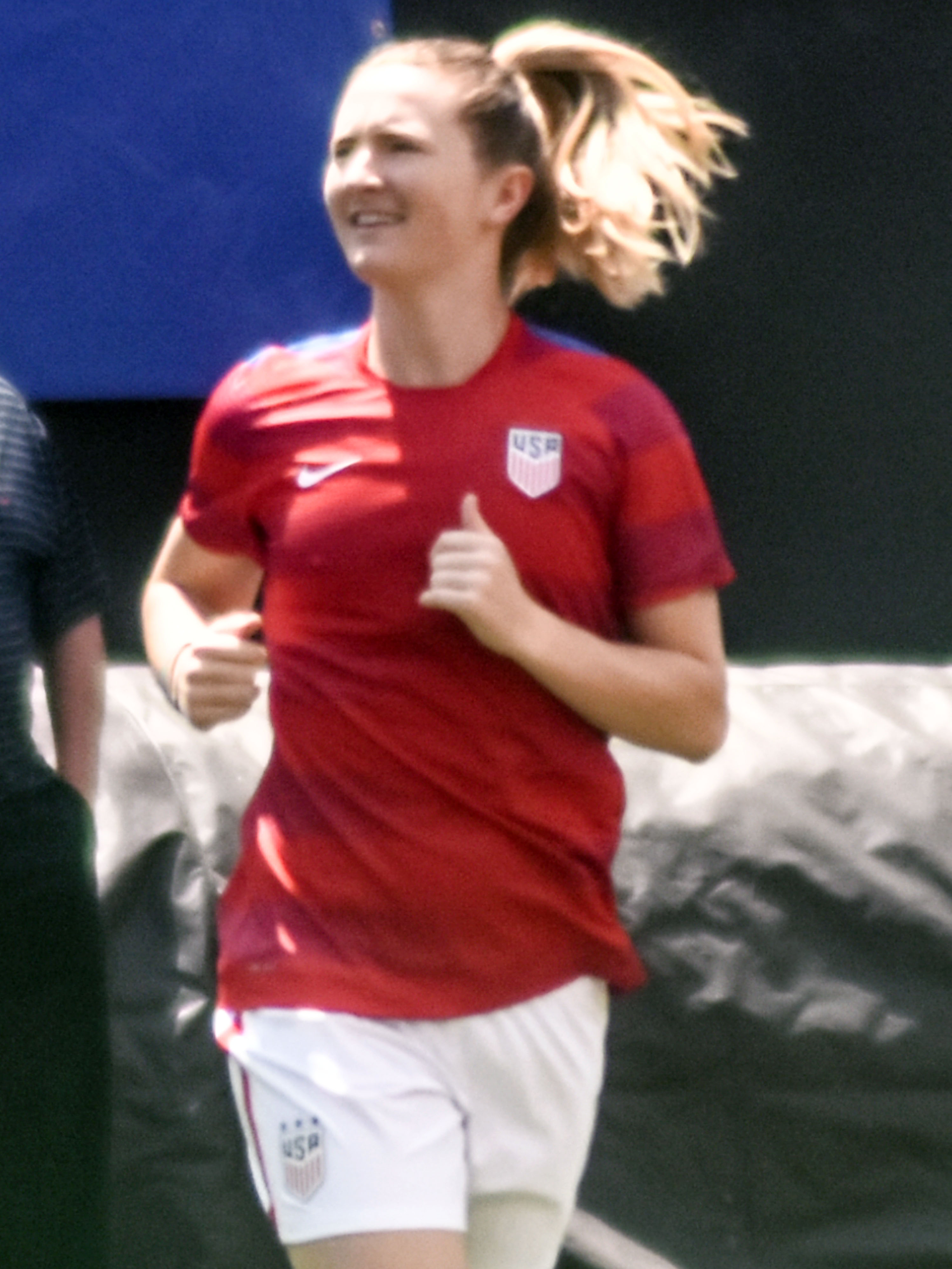 From Flickr user edrost88, match details here